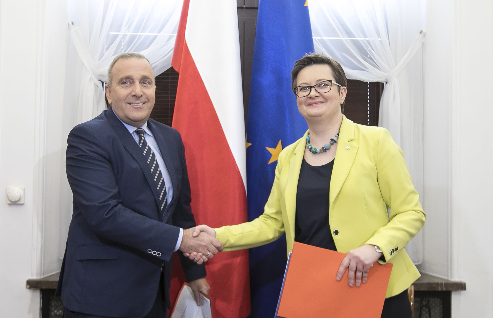 Grzegorz Schetyna i Katarzyna Lubnauer, #WspólnaLista, porozumienie Platformy Obywatelskiej i Nowoczesnej, Warszawa, 07.03.2018.